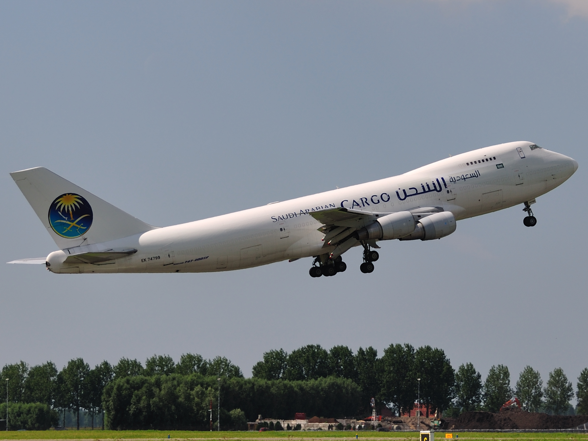 Saudi Cargo EK74799